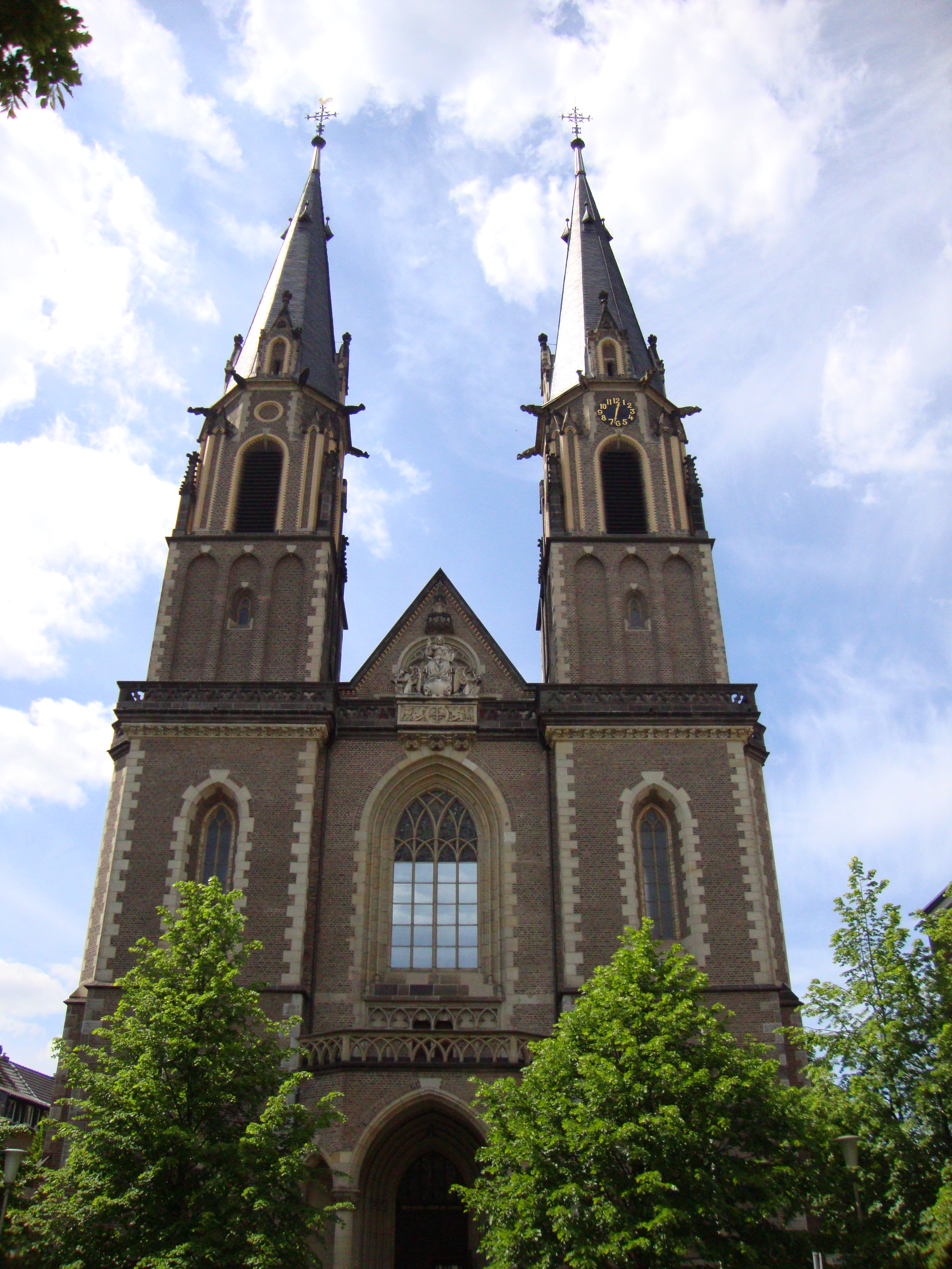 Stiftskirche Sankt Johann Baptist und Petrus in Bonn